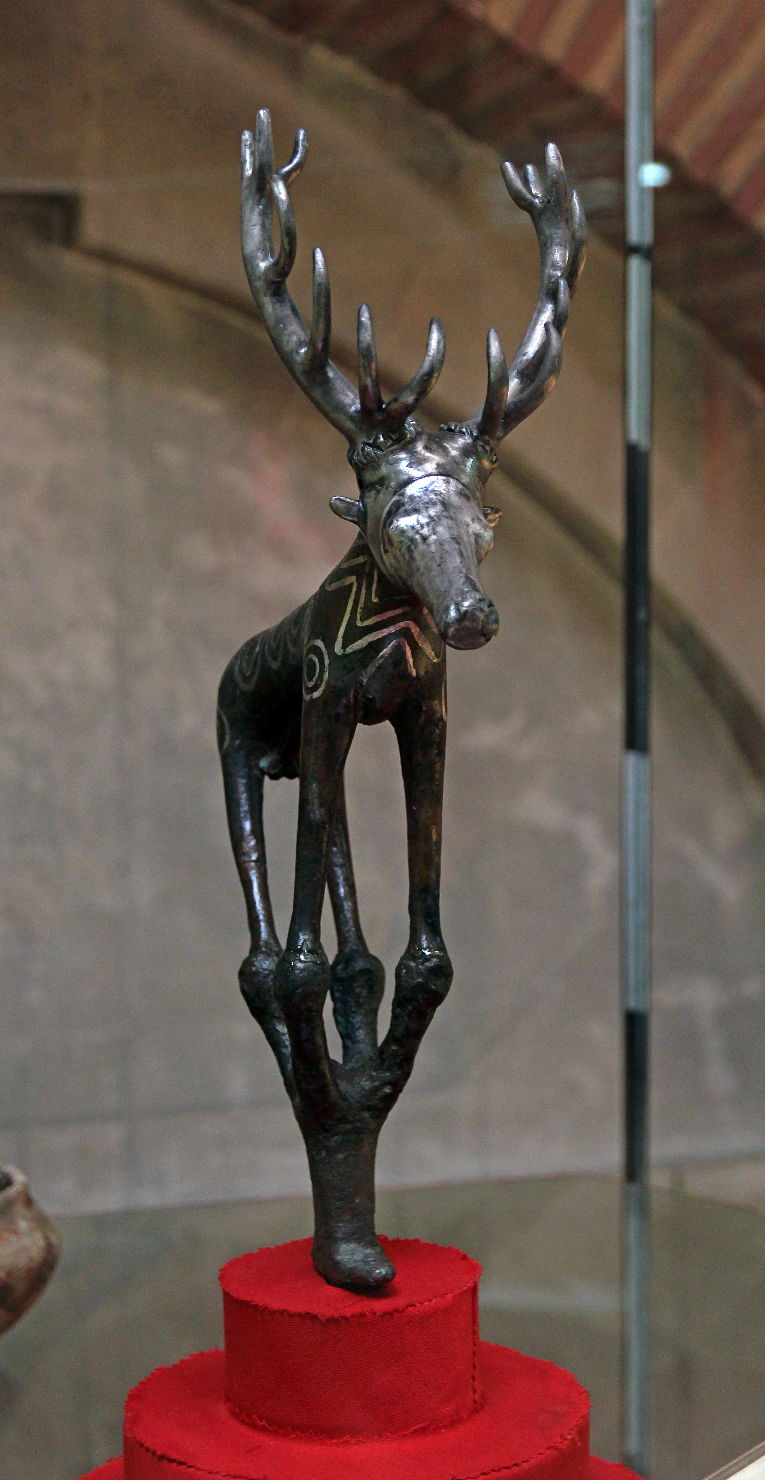 Standarte aus Alaca Höyük mit Darstellung eines Hirsches im Museum für anatolische Zivilisationen in Ankara. Geweih und Schnauze sind mit Silberblech überzogen